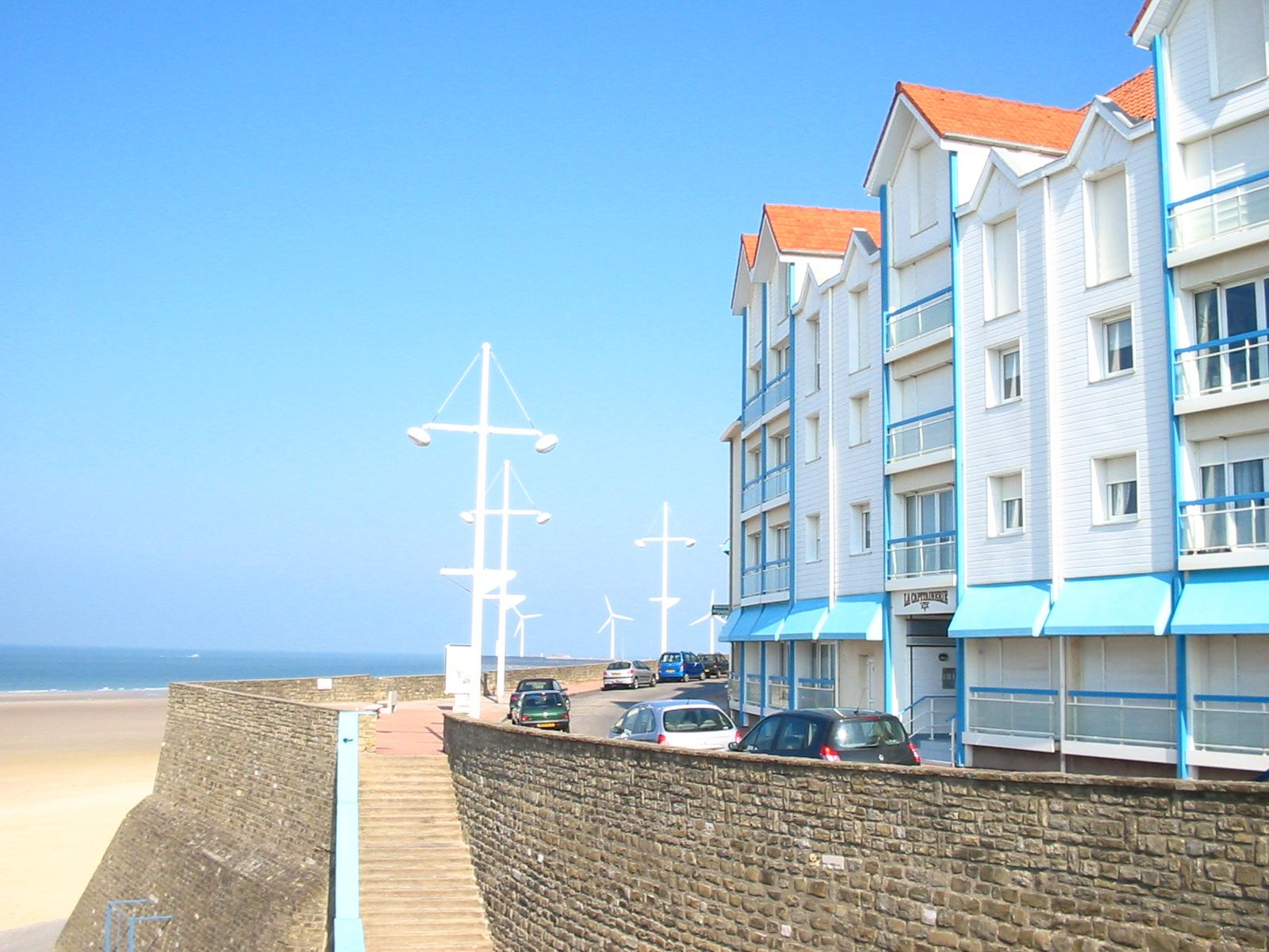 Le Quai Dugay Trouin, face à la Mer -Le Portel Plage, Immeuble "La Capitainerie", auparavant une maison de retraite qui s'appelait "Les Mouettes".